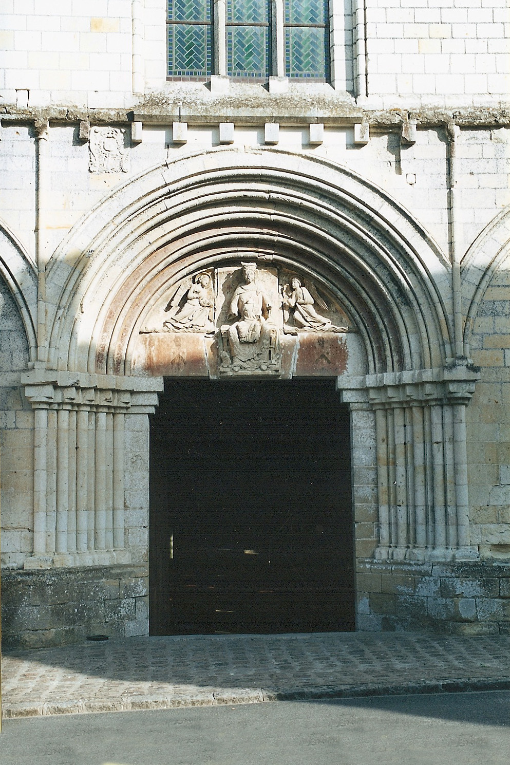 N.-D. Cunault, Hauptportal